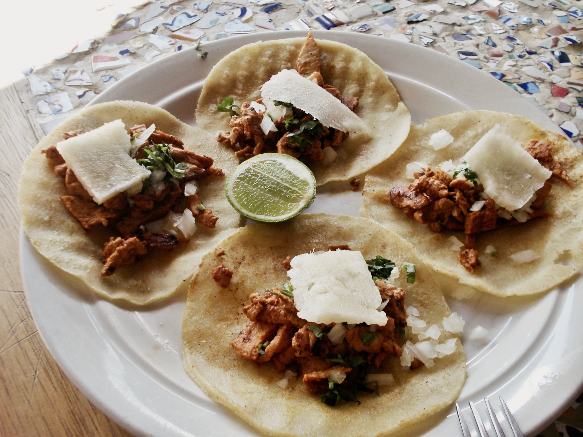 Padrísimo, El Hatillo